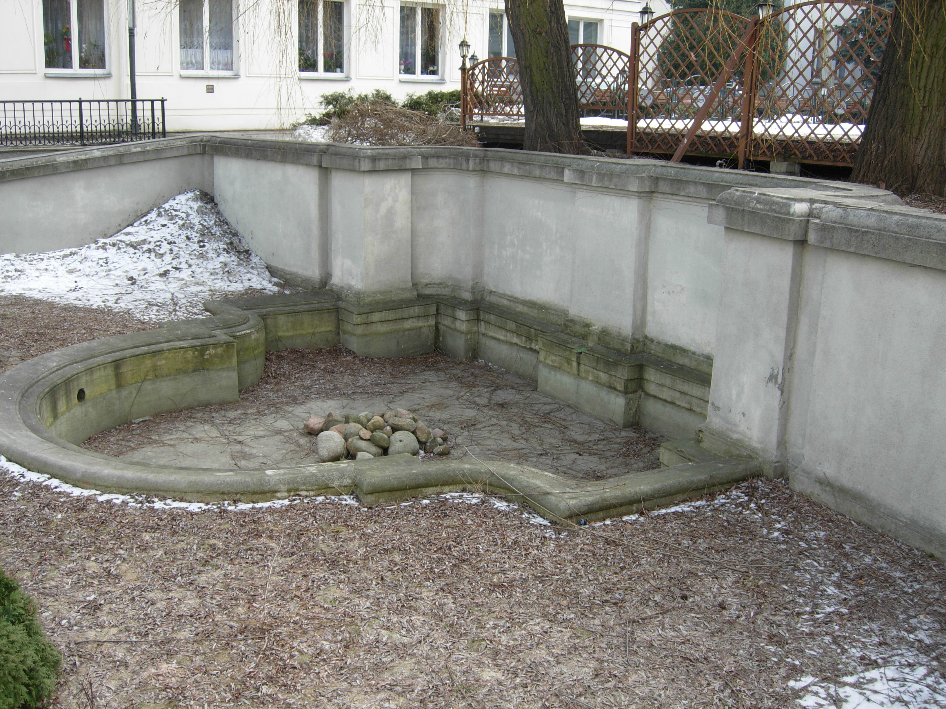 Fontanna na dziedzińcu Pałacu Chodkiewicza w Warszawie.